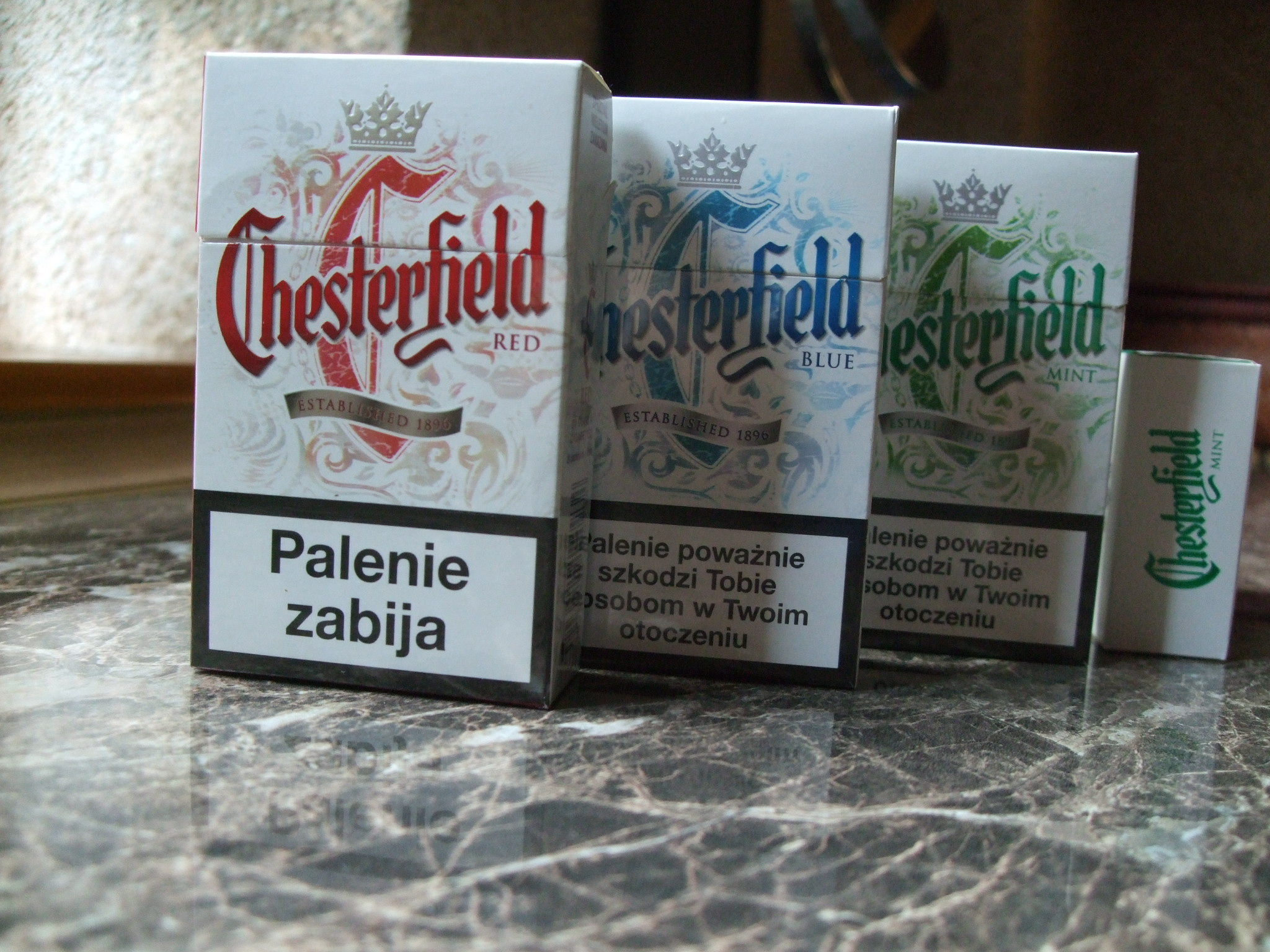 Chesterfield.